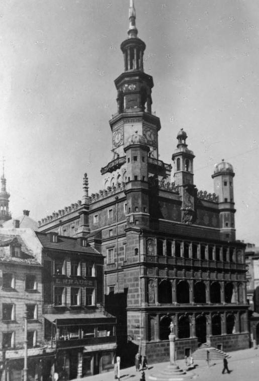 Posen, Rathaus Posen. Rathaus